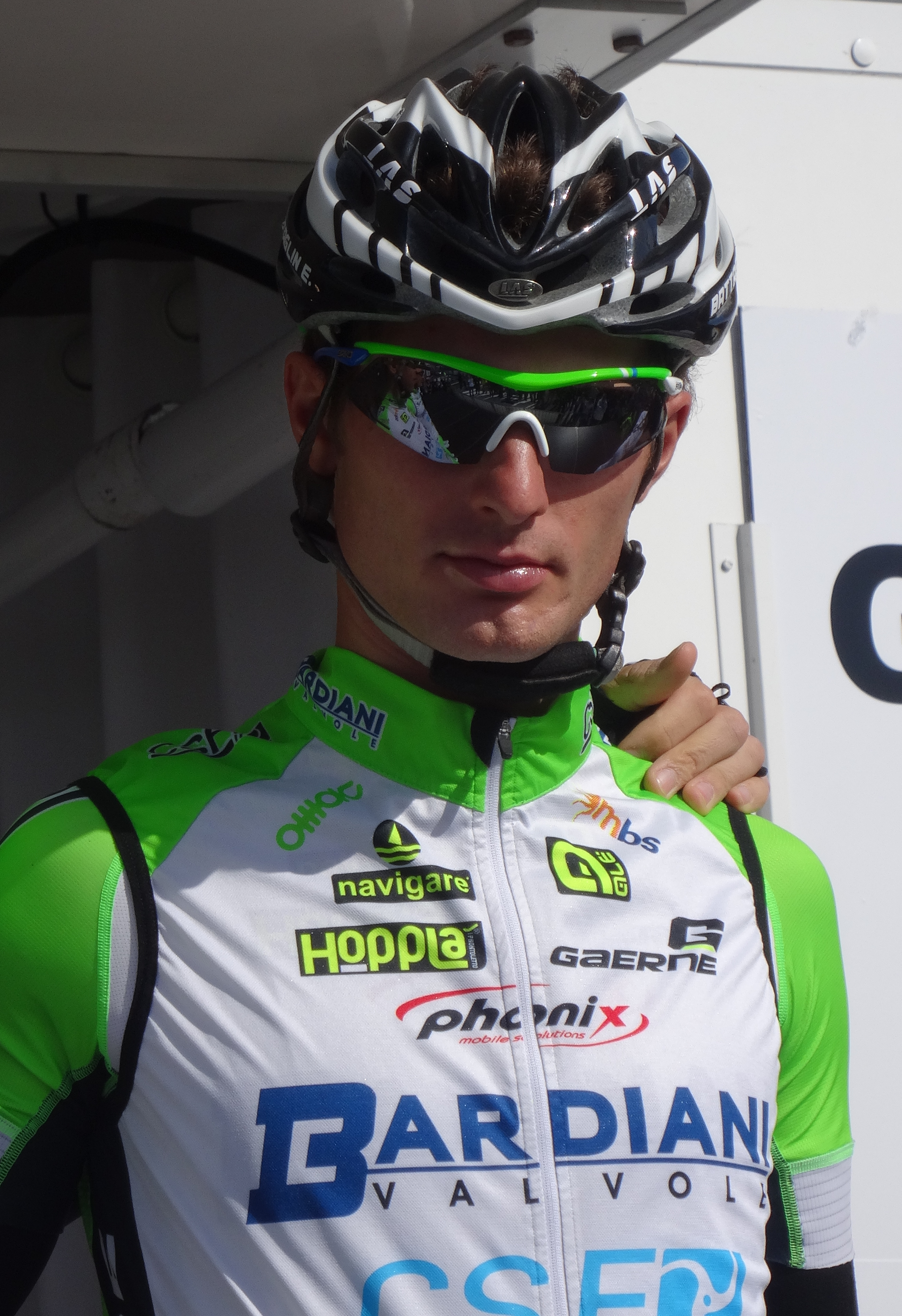 Reportage réalisé le jeudi 17 avril à l'occasion du départ et de l'arrivée du Grand Prix de Denain 2014 à Denain, Nord, Nord-Pas-de-Calais, France.